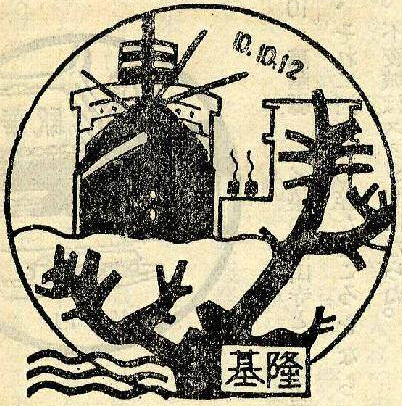 1937年的基隆車站印章